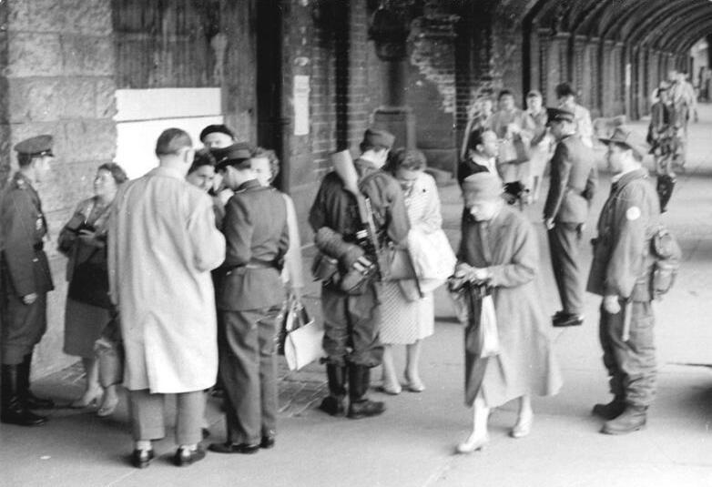 ADN-ZB-Hesse-Berlin: Sicherung der Staatsgrenze am 13.8.1961. -Abfertigung am Grenzübergang Oberbaumbrücke am 13.8.1961. Veröffentlichung nur mit Genehmigung der Pressestelle des MDI